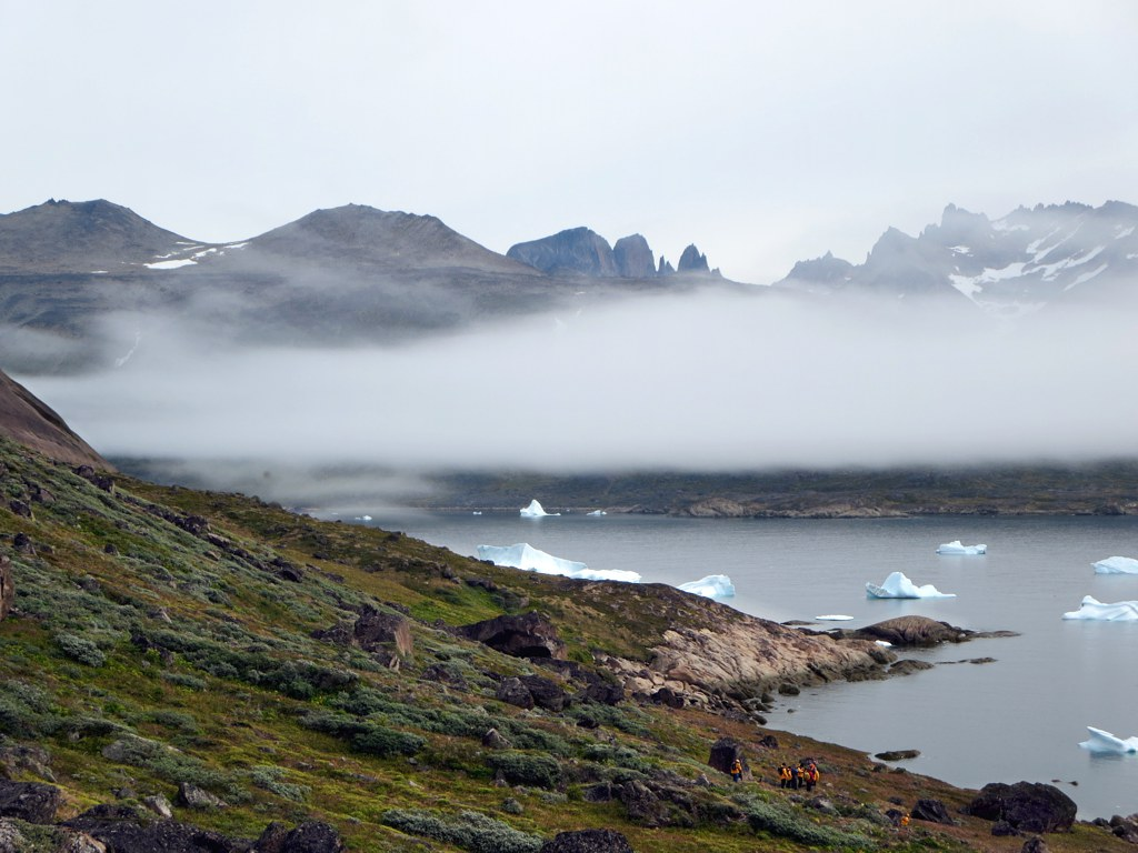 Panorama du site archéologique d'Herjolfsnes